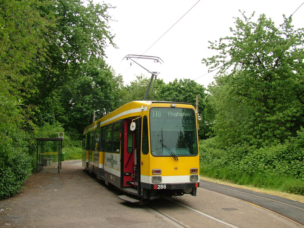 Tramcar 286 (type M-Wagen) of the Muelheimer VerkehrsGesellschaft waiting at Friesenstrasse stop Straßenbahnwagen 286 (Typ M-Wagen) der Mülheimer VerkehrsGesellschaft wartet an der Haltestelle Friesenstraße auf die Rückfahrt picture taken by myself / selbst fotografiert (User:Stefan Kunzmann)